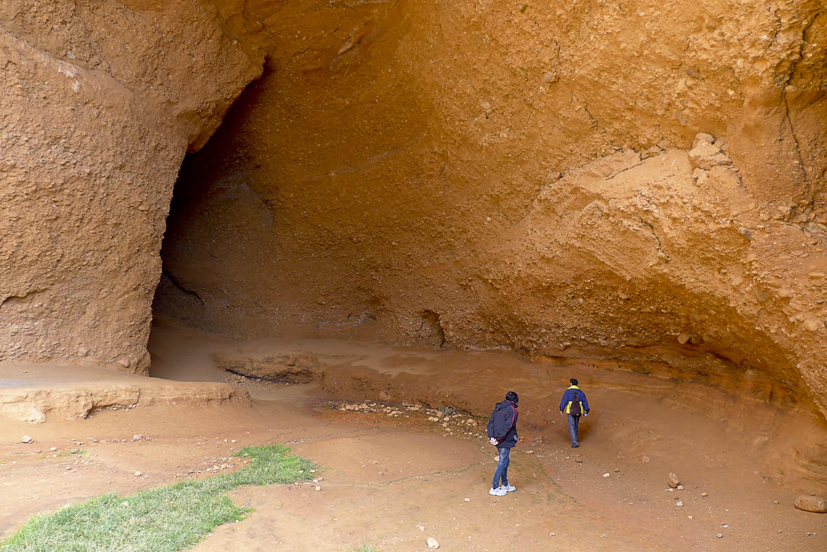 Spain-Las Médulas -P1170001